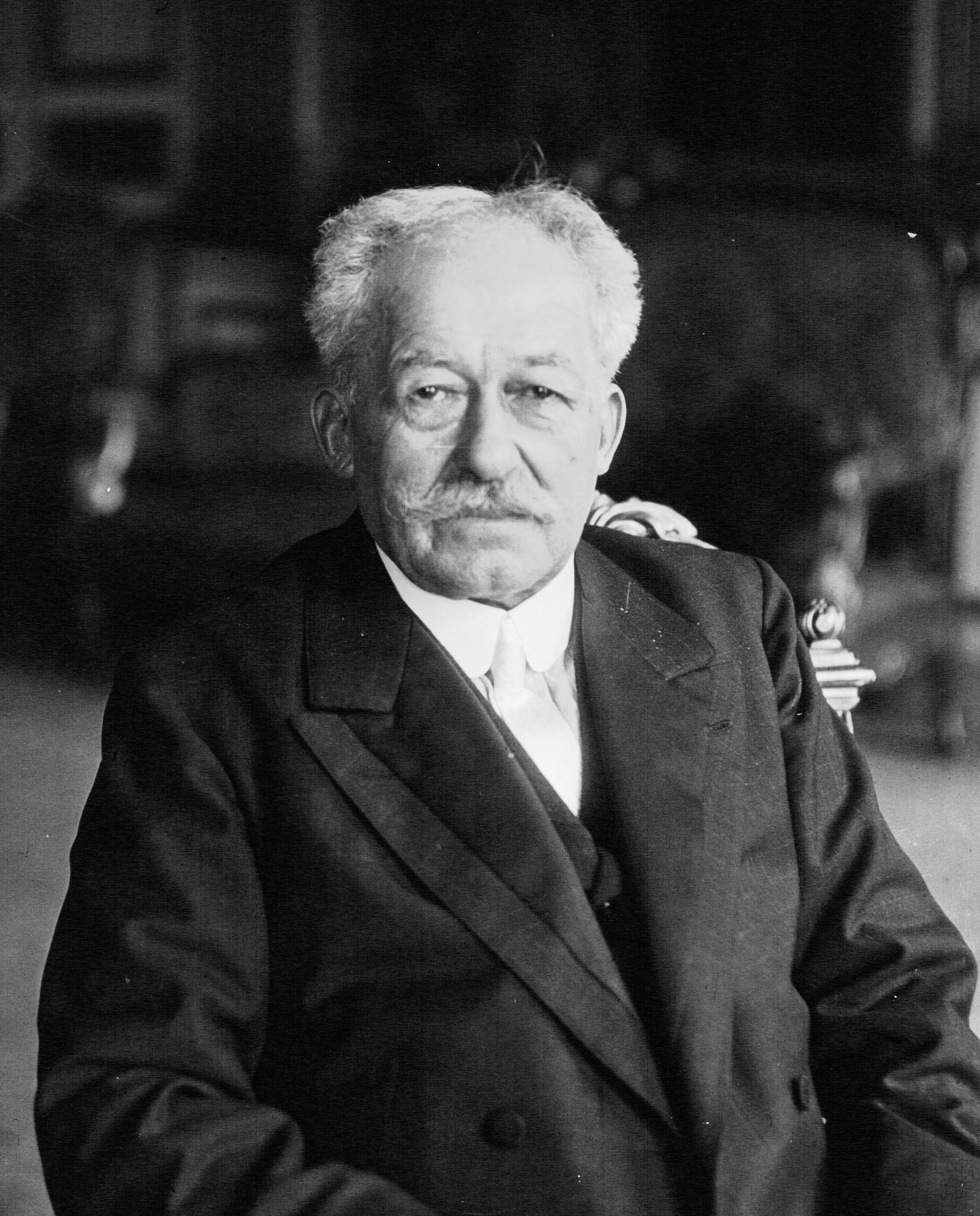 M. Colliard ministre du Travail : photographie de presse